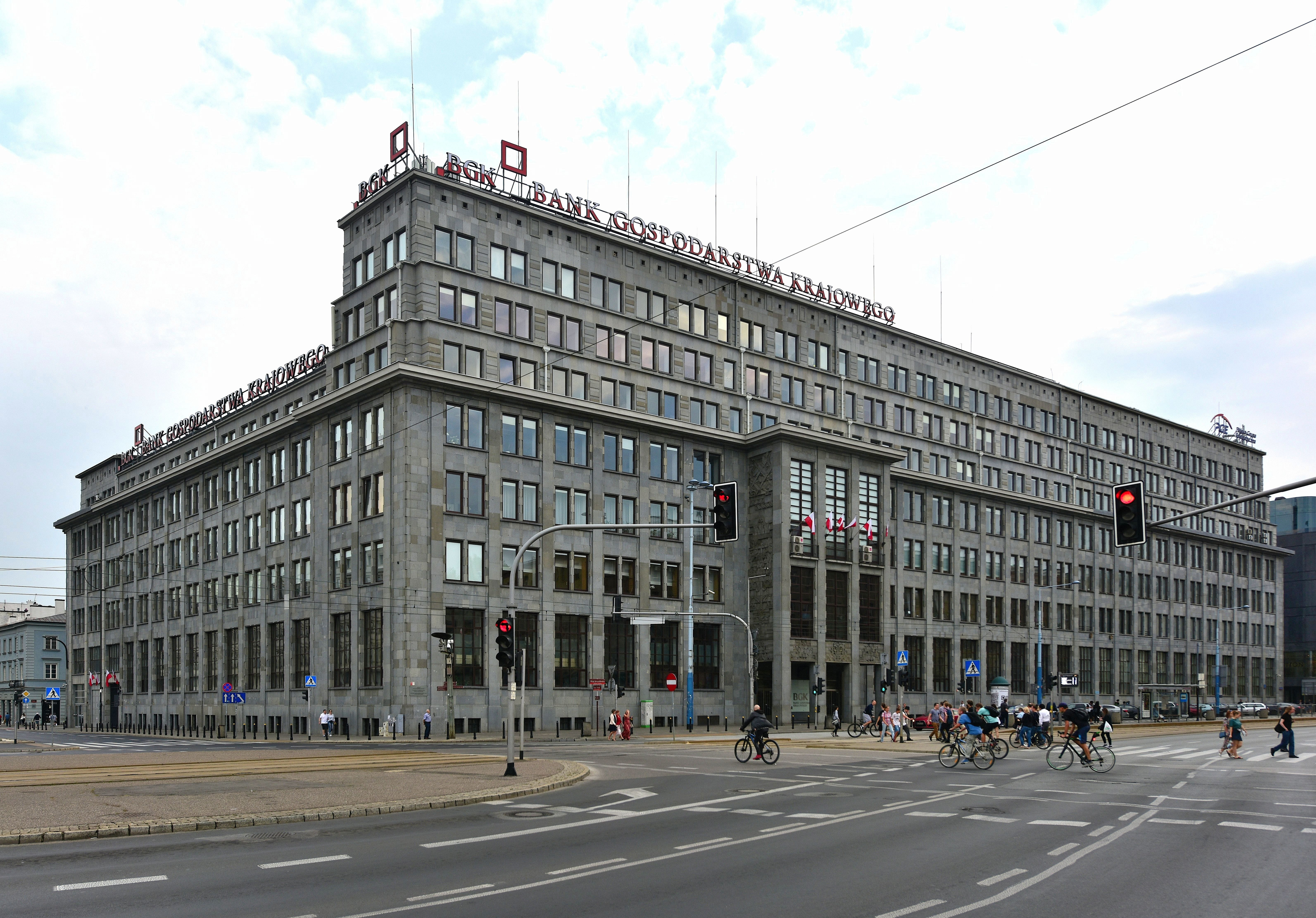 Gmach Banku Gospodarstwa Krajowego przy Alejach Jerozolimskich 7. w Warszawie